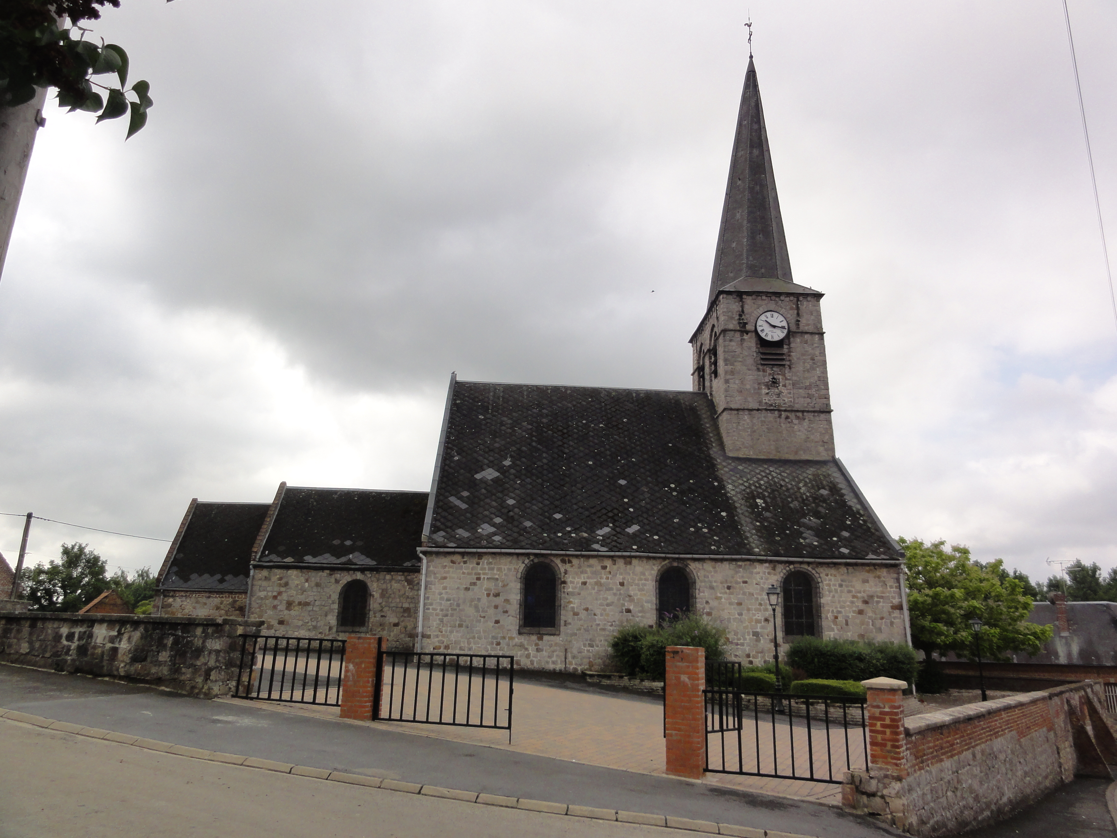 Bermerain (Nord, Fr) église, vue latérale